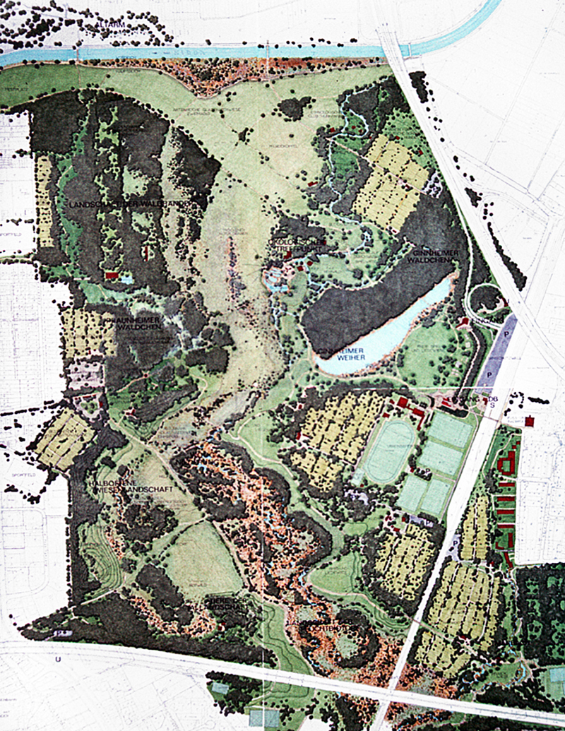 Der 1. Preis beim Ideenwettbewerb Volkspark Niddatal 1982 Ausschnitt)